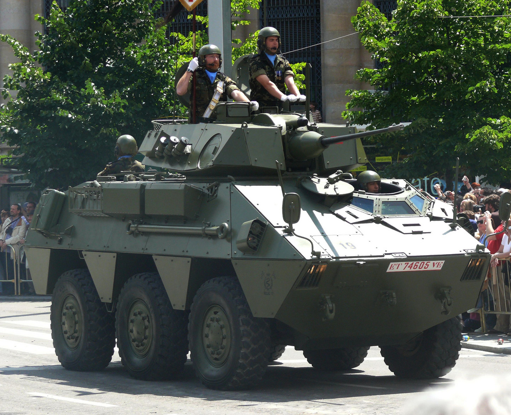 VEC (Vehículo de Exploración de Caballería) del Ejército de Tierra de España en el desfile del día de las Fuerzas Armadas de España del 2008 en Zaragoza. 1 de junio de 2008